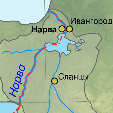 Принаровье